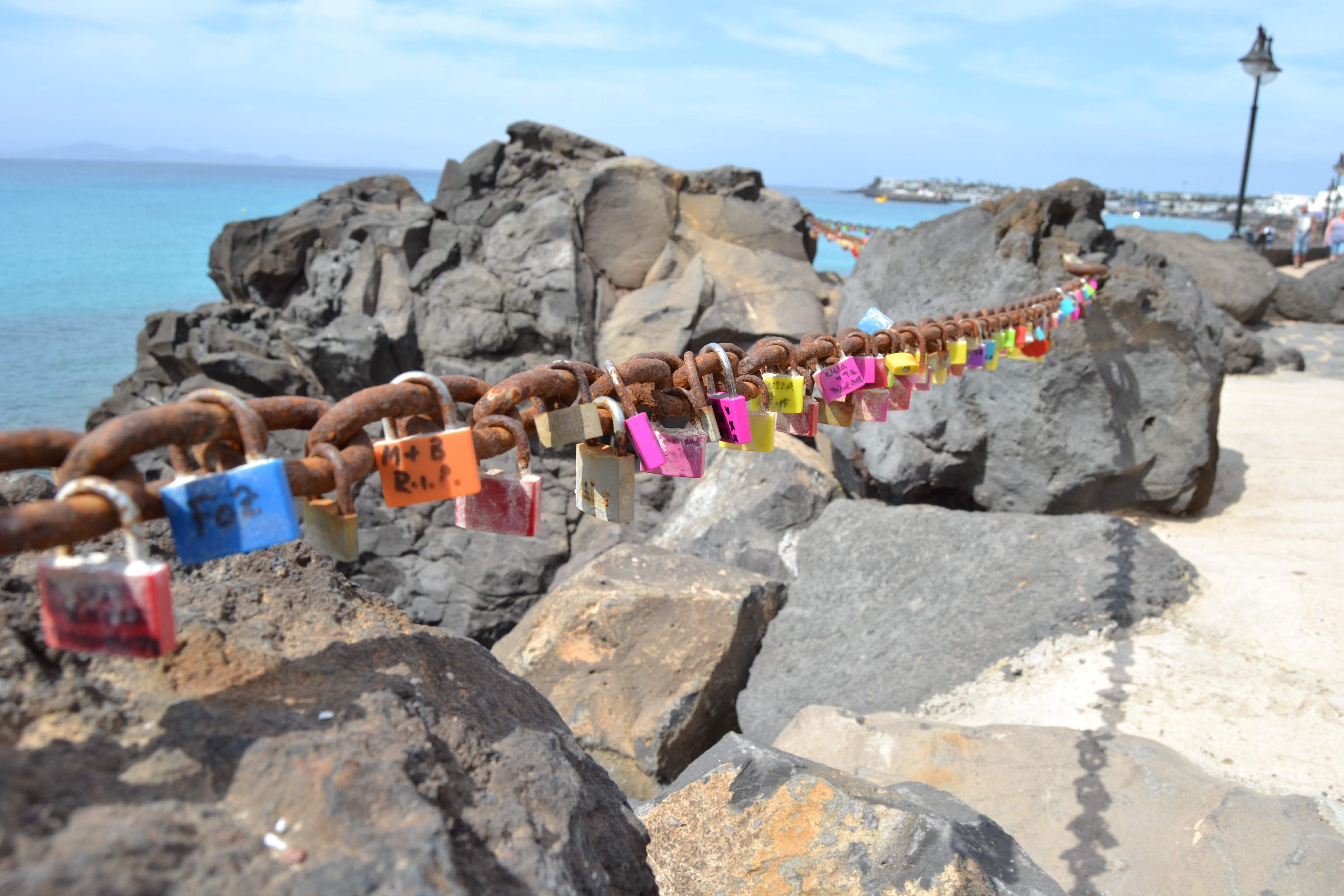 Las cadenas del paseo marítimo de Playa Blanca, en el Municipio de Yaiza, Lanzarote están llenas de los conocidos candados del amor. Actualmente no revisten peligro para el ecosistema del lugar, por tratarse de una cadena que sirve de pasarela en el paseo marítimo.